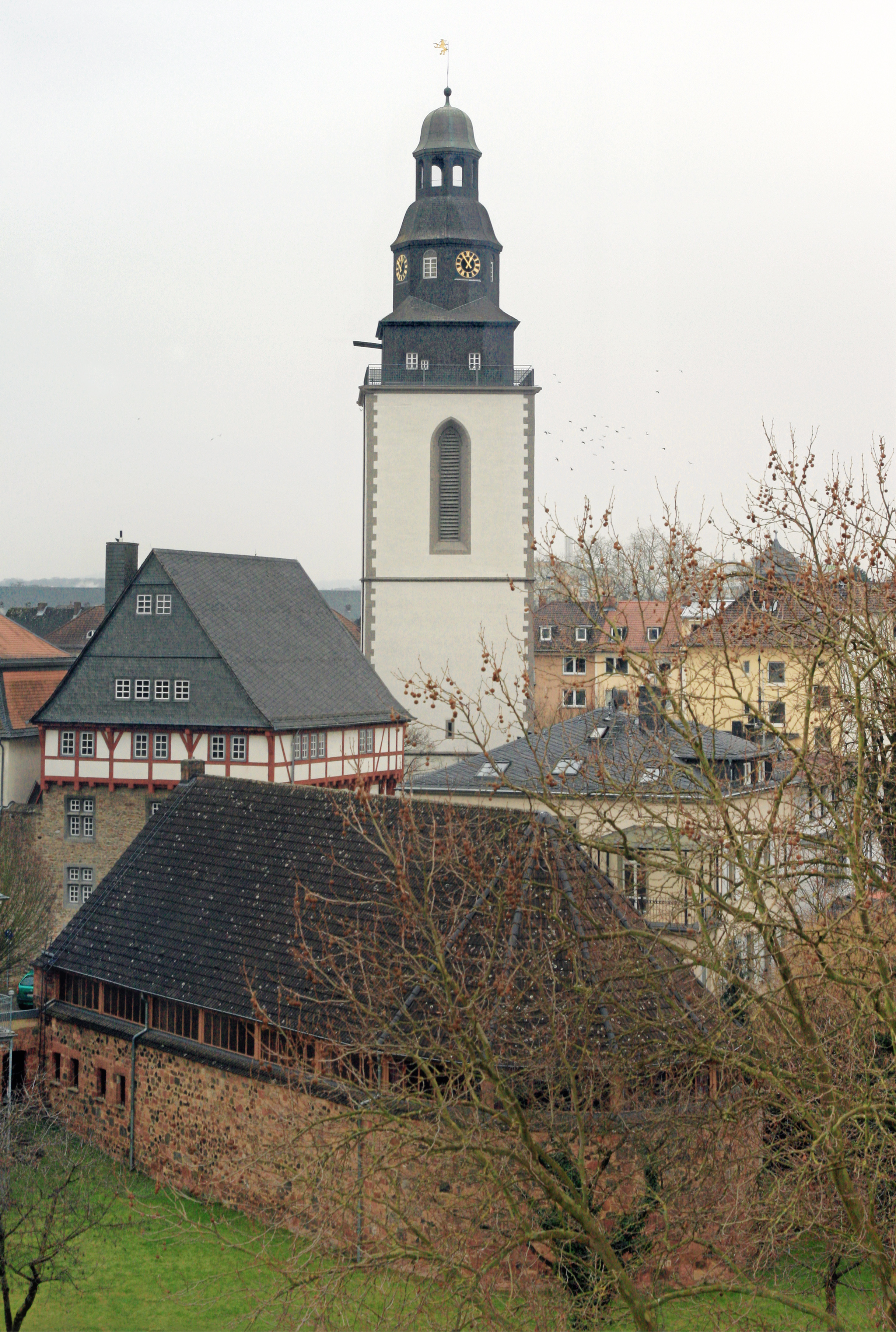 Pankratiuskapelle (im Vordergrund), Leibsches Haus (mit rotem Fachwerk) und Stadtkirchenturm (mit welscher Haube) von Westen. This is a picture of the hessian Kulturdenkmal (cultural monument) with the ID 60446